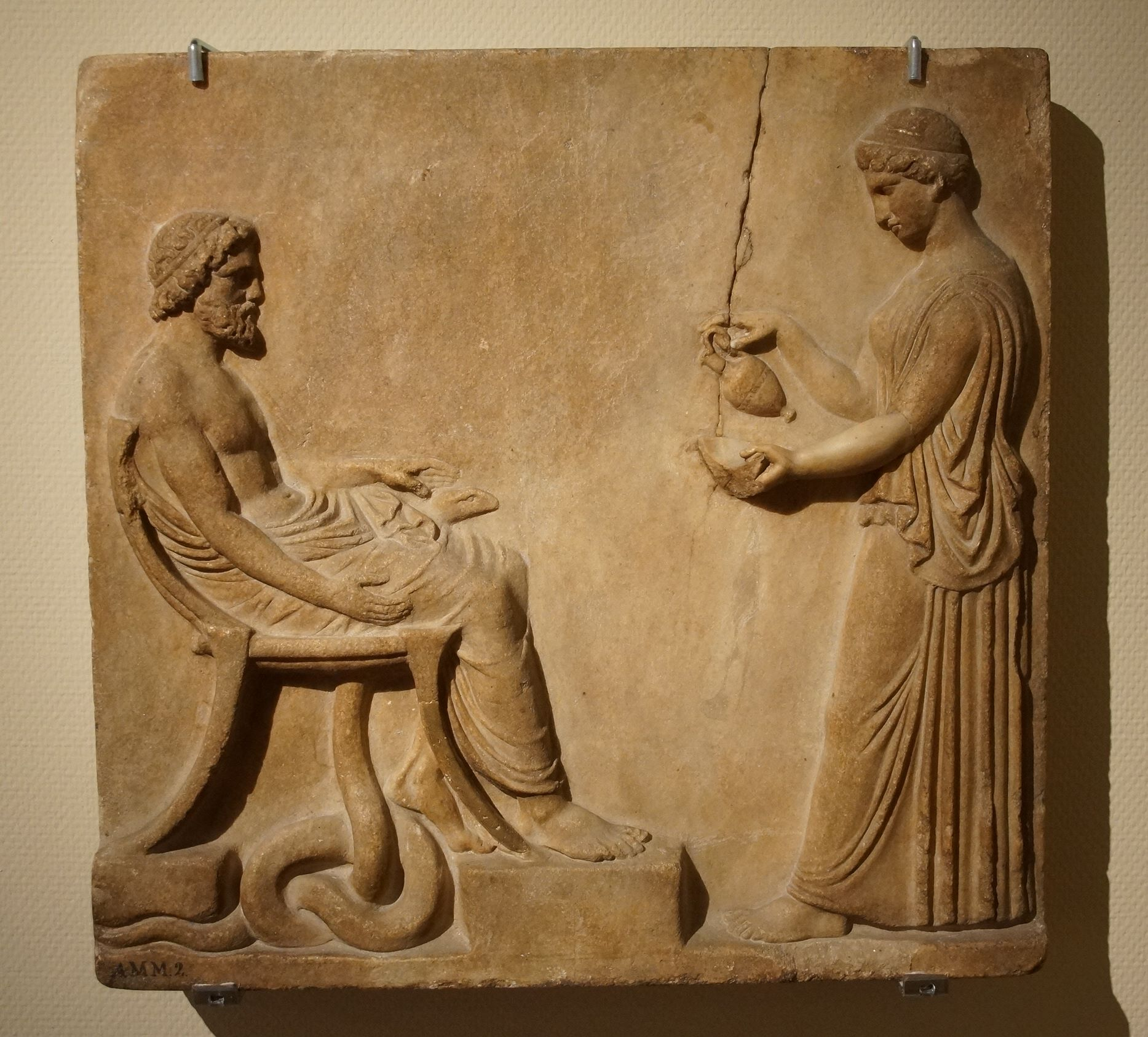 Rijksmuseum van Oudheden, Asclepius and Hygieia. Asclepius with his staff is accompanied by his daughter Hygieia, who pays homage to him by offering wine as a libation from a bowl. Marble, Italy, 1st century AD